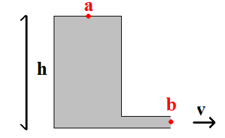 wet van Toricelli.